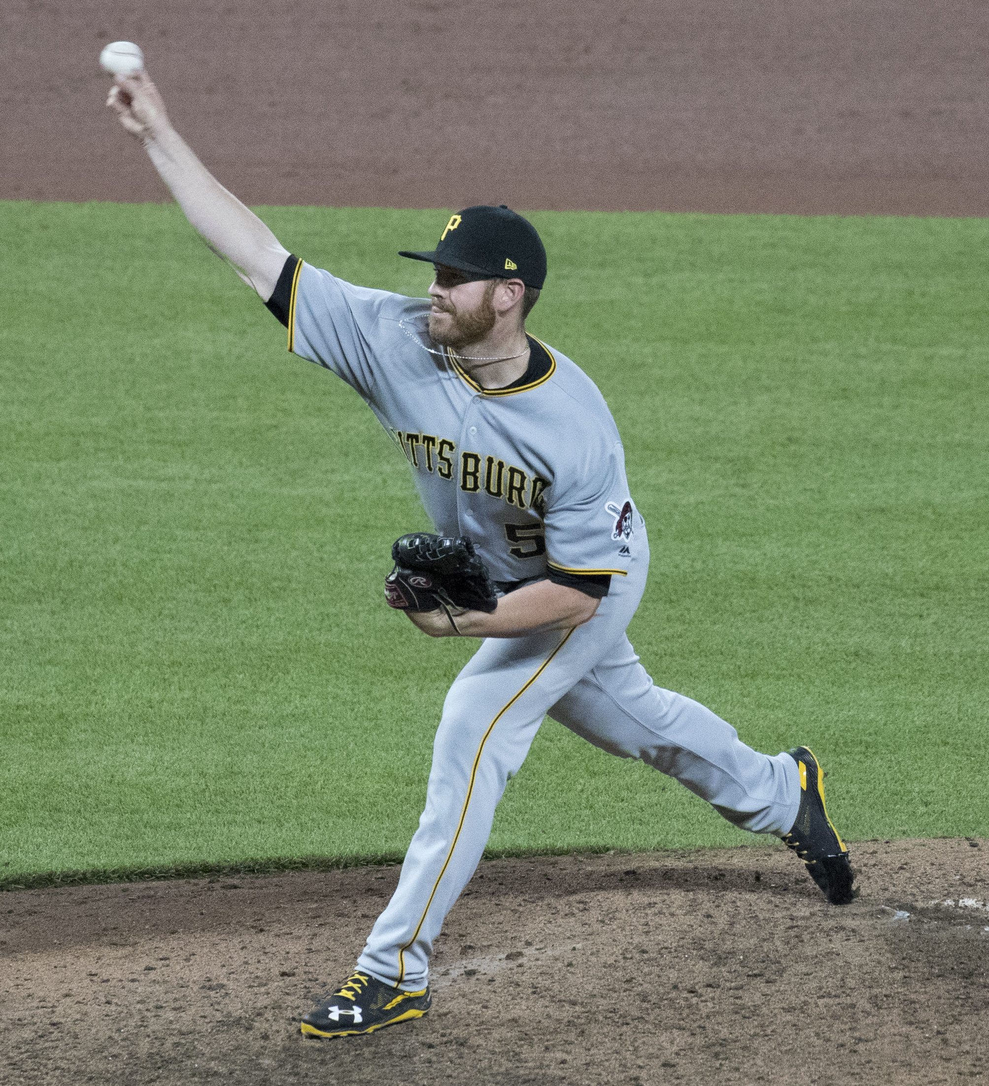 Pirates at Orioles 6/7/17